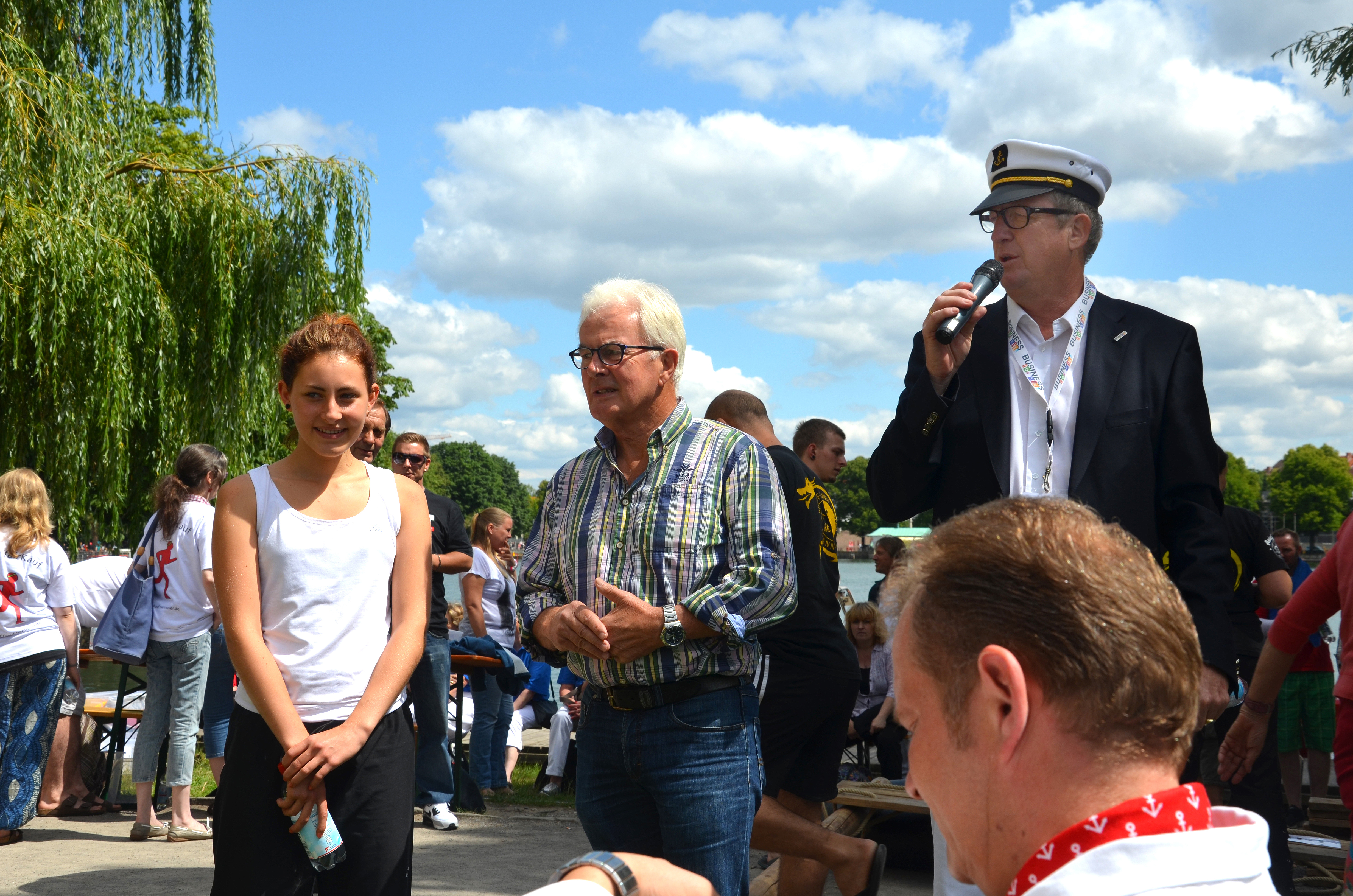 Während des Aufbaus am Maschsee in Hannover zum Weltrekord für das größte bemannte Floß der Welt beglückwünscht Joachim Wehrmann (am Mikrofon), 1. Vorsitzender des veranstaltenden Vereins Business for Kids e.V., den CDU-Landtagsabgeordneten und Vorsitzenden des Vereins HAUS & GRUNDEIGENTUM Hannover, Verband der privaten Wohnungswirtschaft e.V., Rainer Beckmann ...